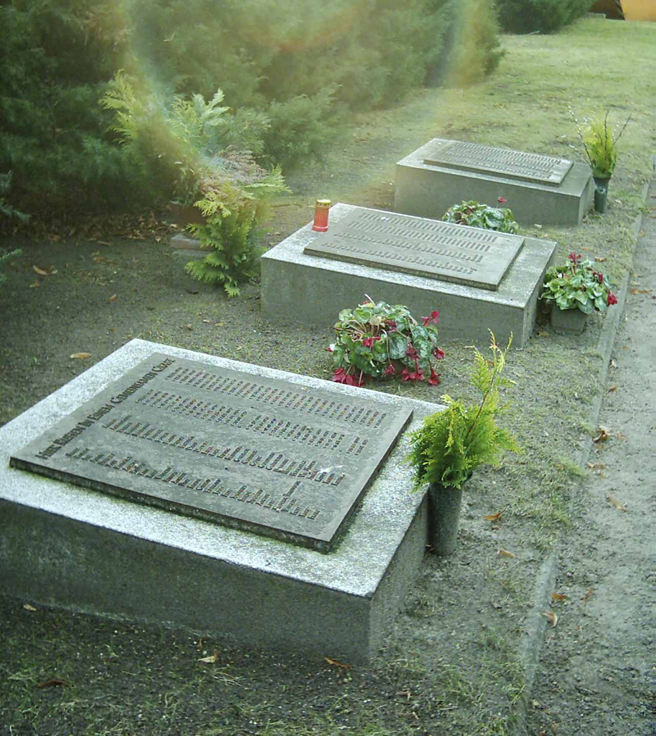 Die Sammelgrabanlage für Kriegsopfer auf dem Friedhof Heinersdorf